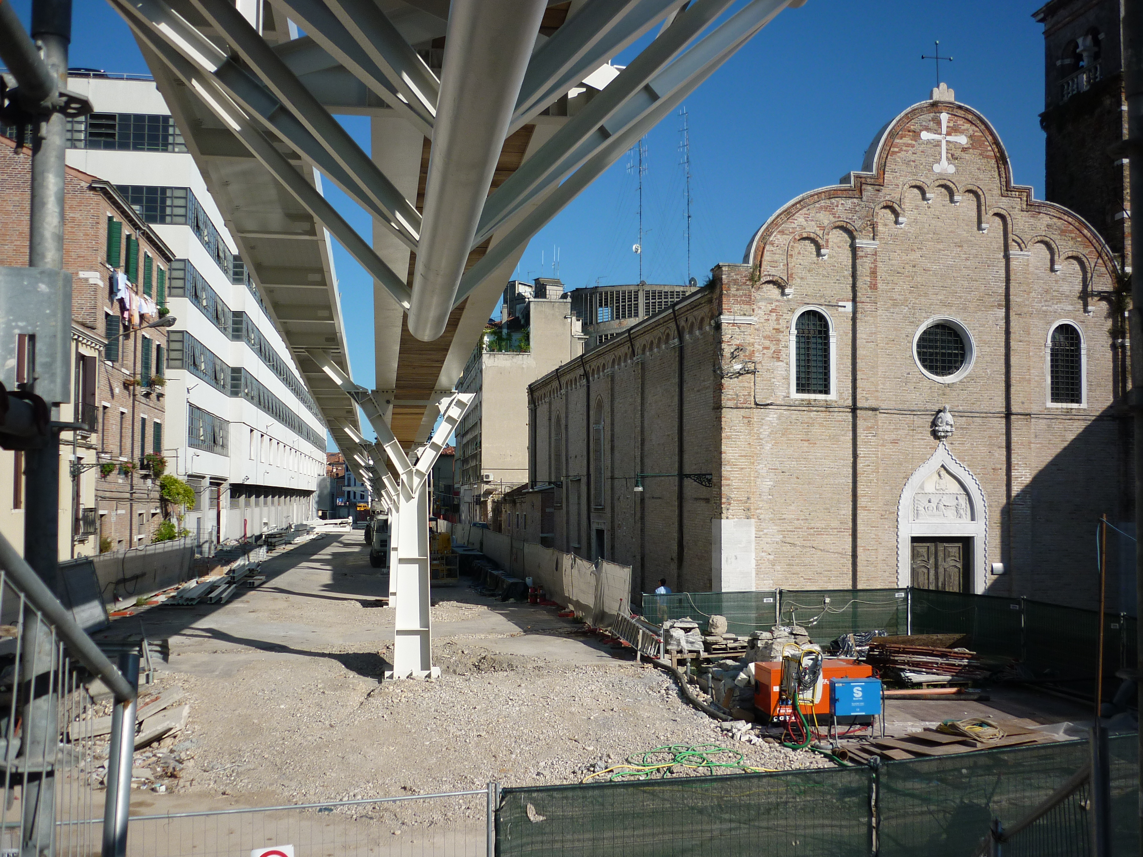 people mover